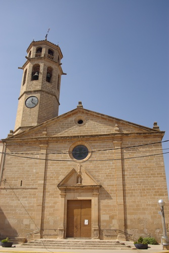 església de St Pere de Puigverd de Lleida